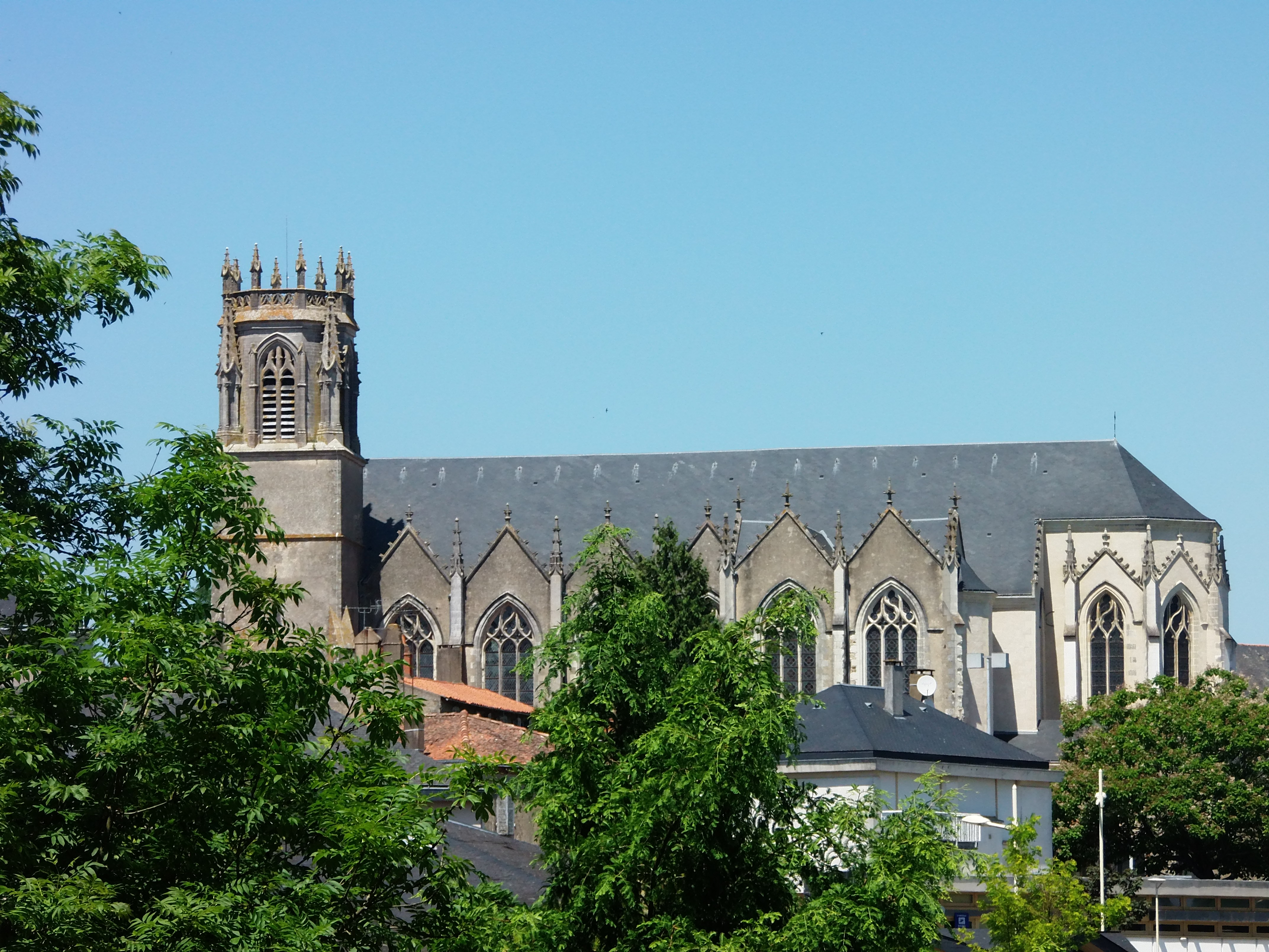 Église Saint-Jean-Baptiste de Maulévrier (Maine et Loire, France), des XVIIIe et XIXe siècles inscrite à l'Inventaire général du patrimoine culturel français (IA49003932). Juillet 2015.